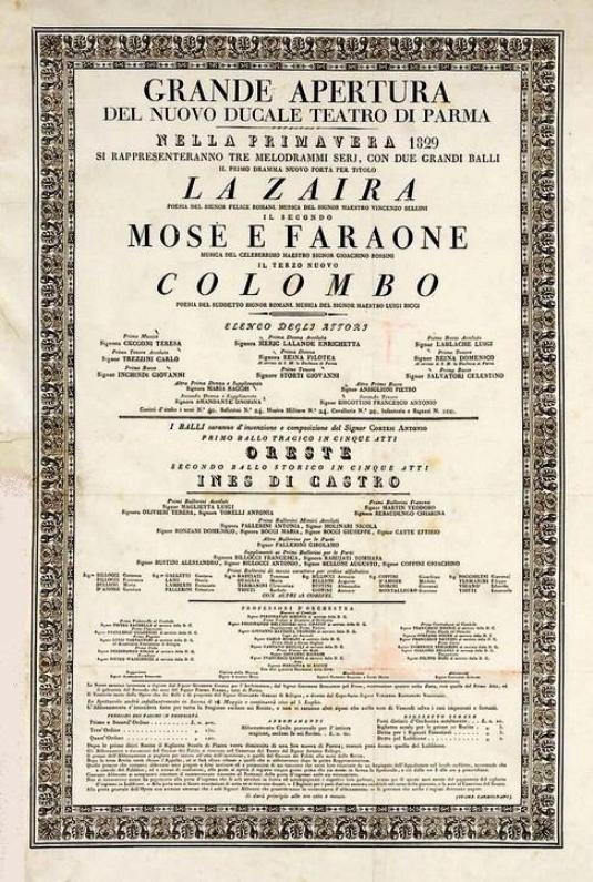 Cartellone dell'inaugurazione del Teatro Regio di Parma nel 1829.